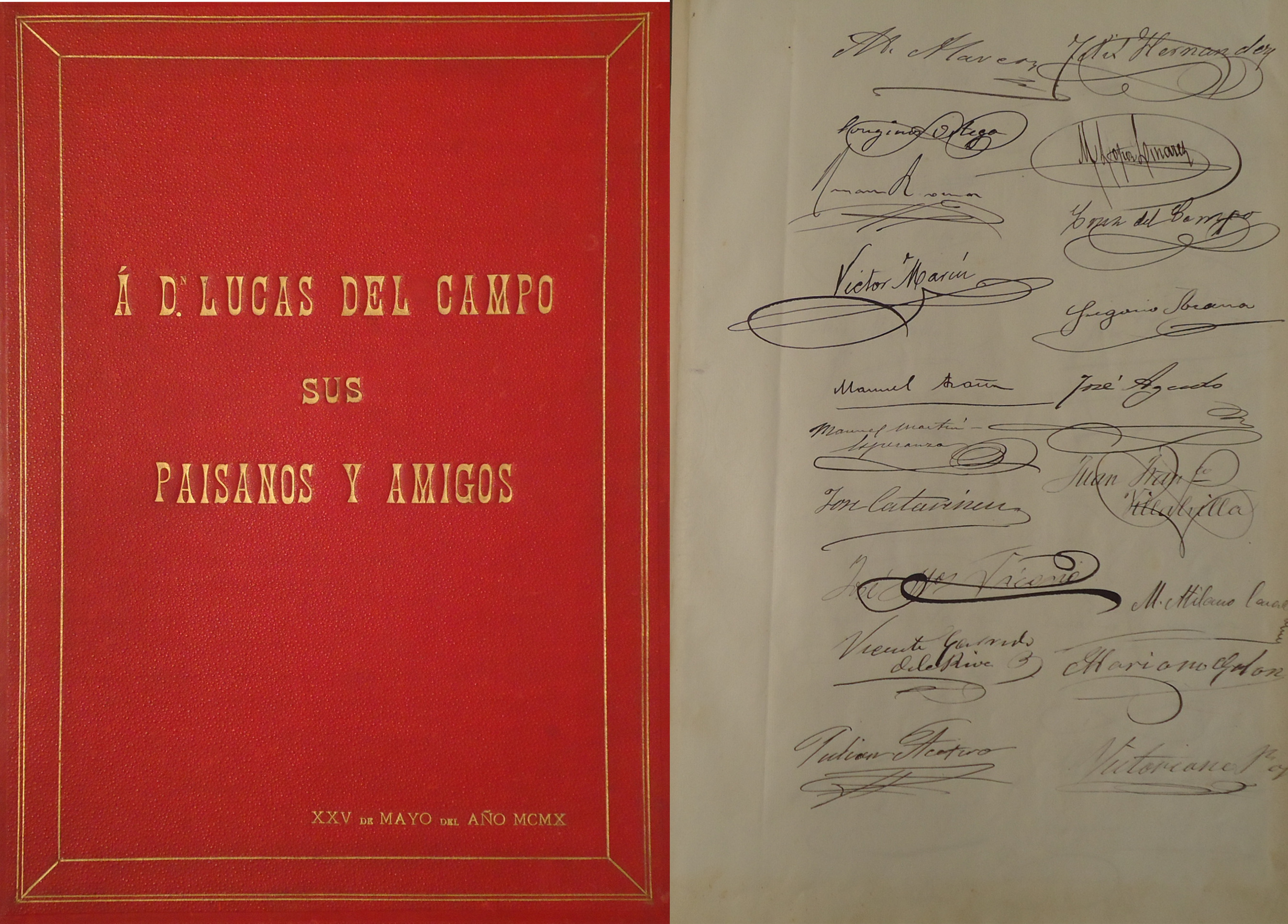 Homenaje a Lucas del Campo y Fernández (1910)